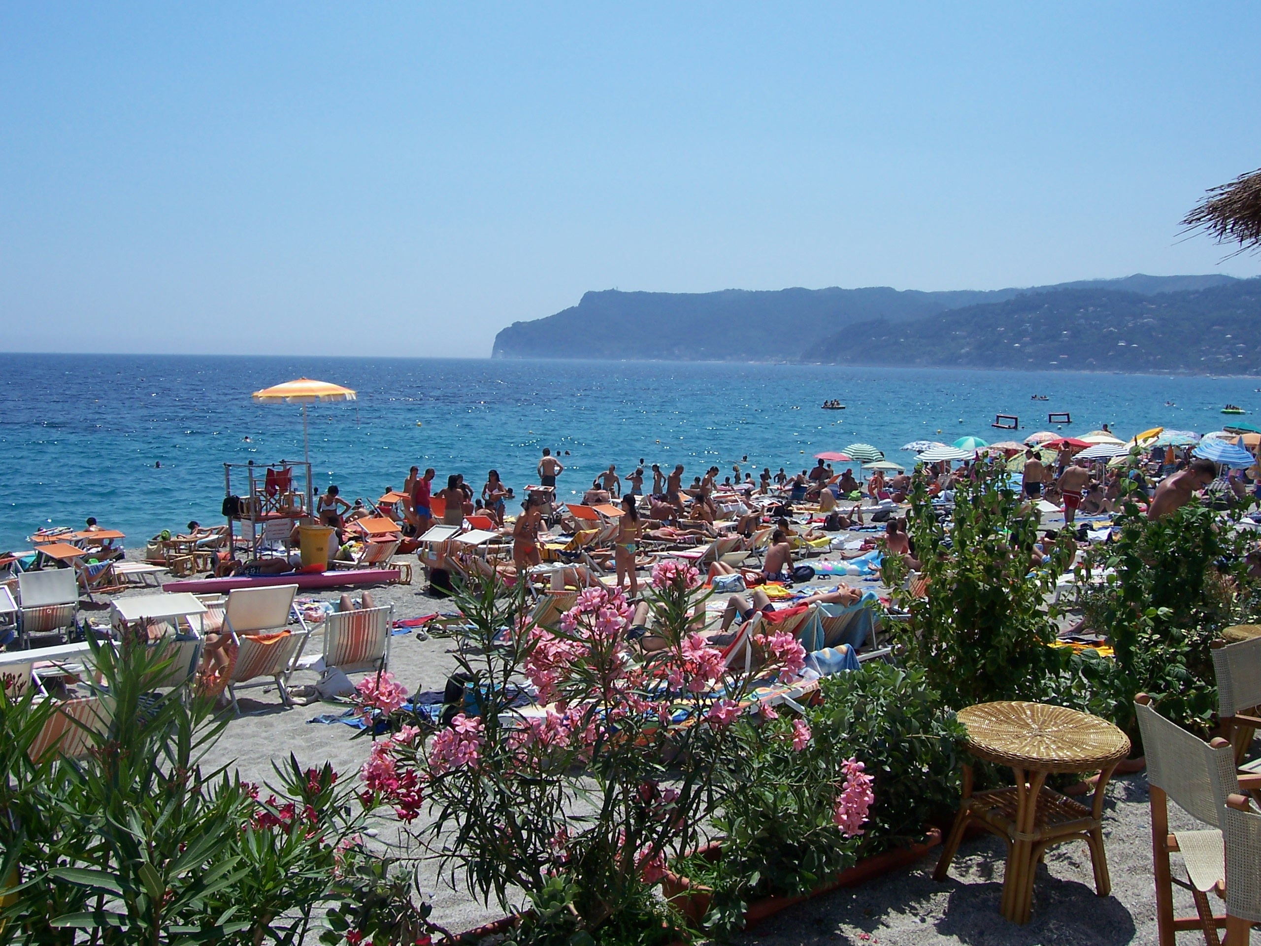 La spiaggia